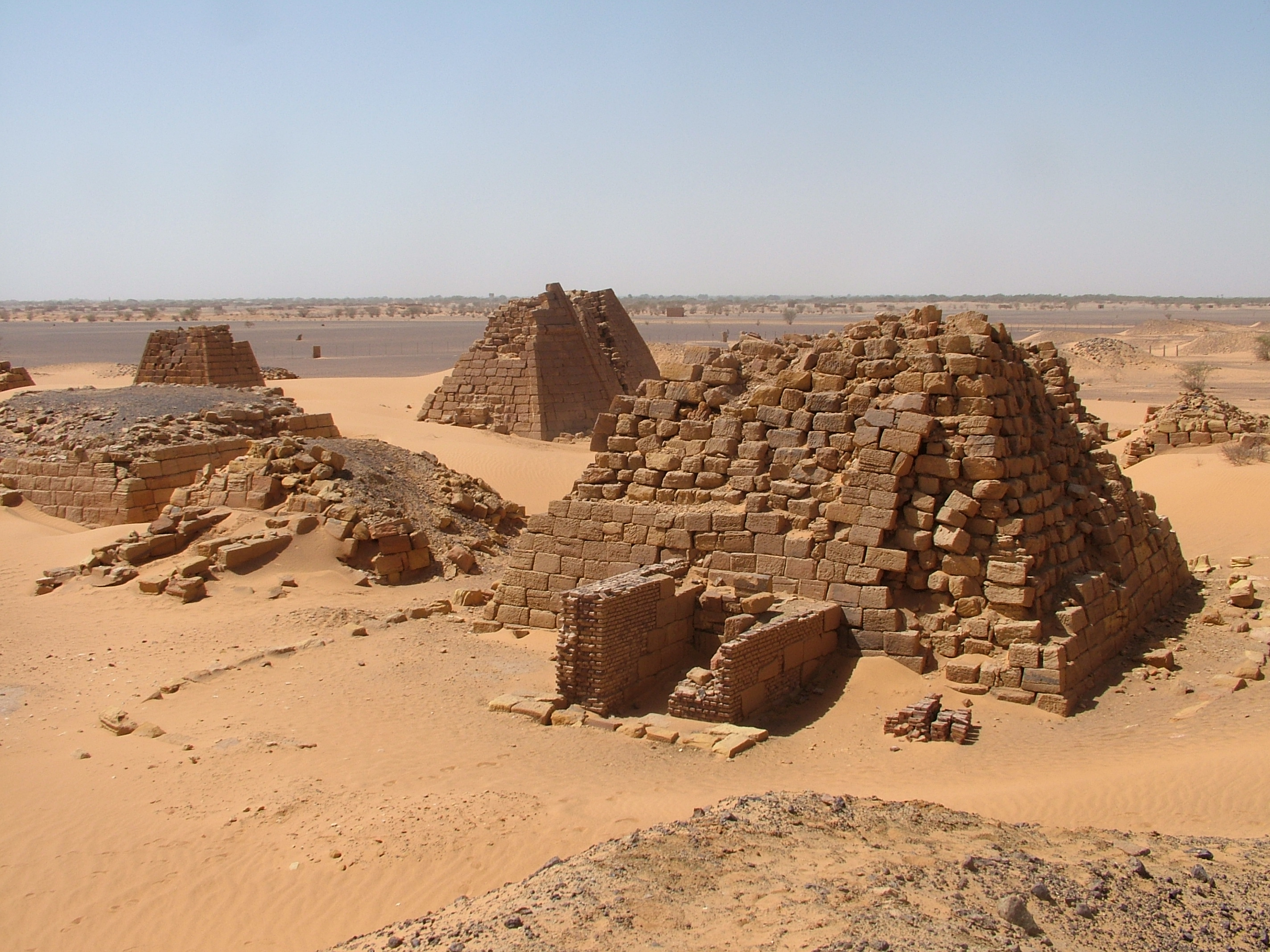 Nyugati piramistemető, Meroé, Szudán (BegW)